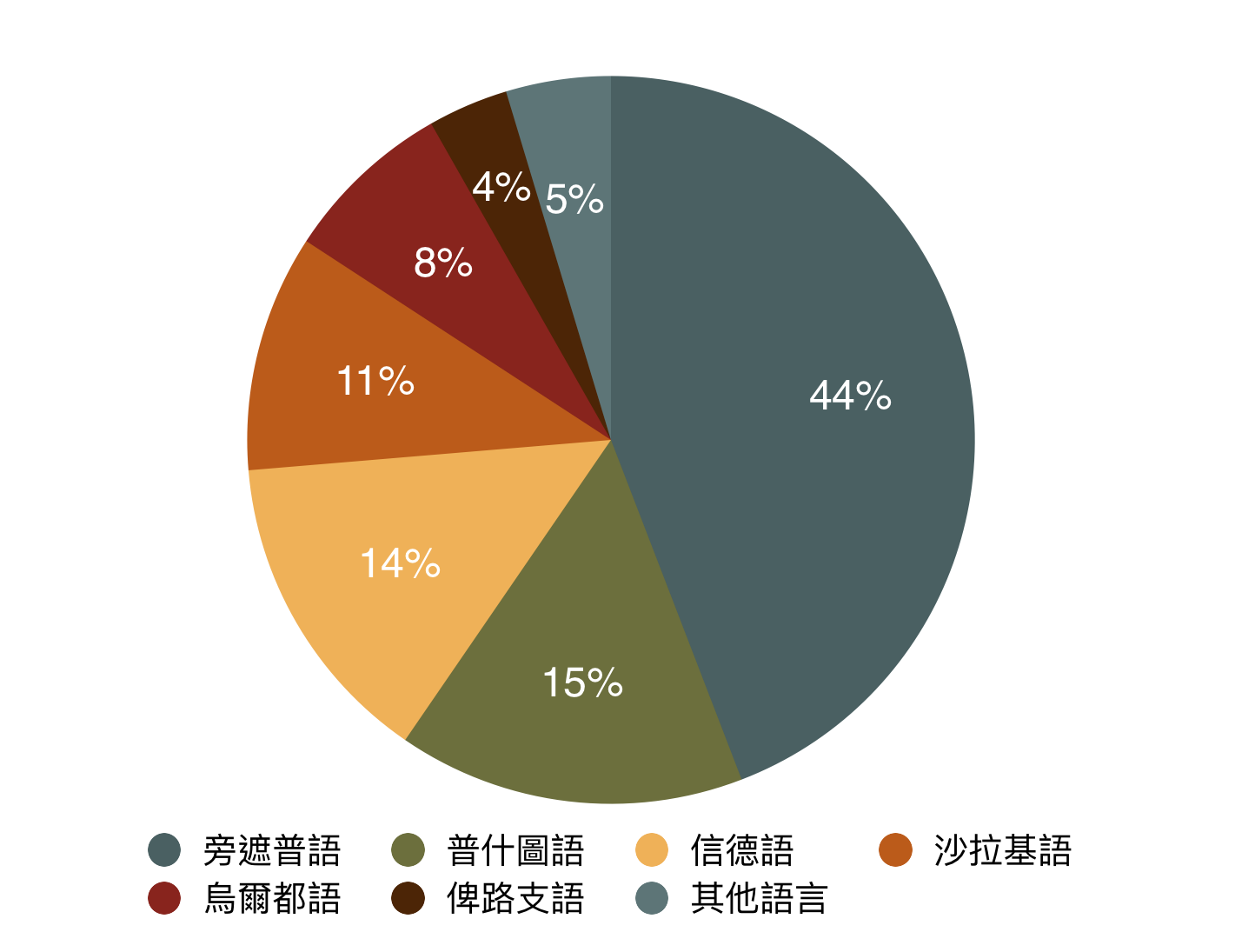 巴基斯坦人之母語所佔比例的扇形圖